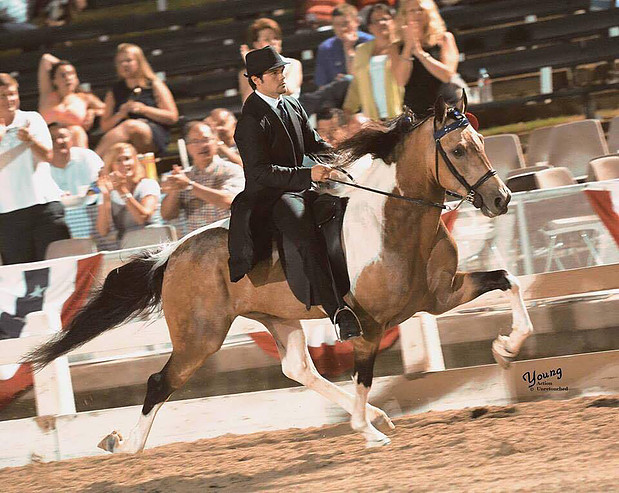 Jacob Parks with Falcon Blue Ribbon